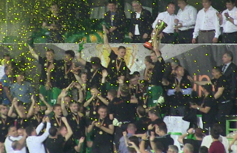 24 мая 2014 Кишинёв, Стадион Зимбру